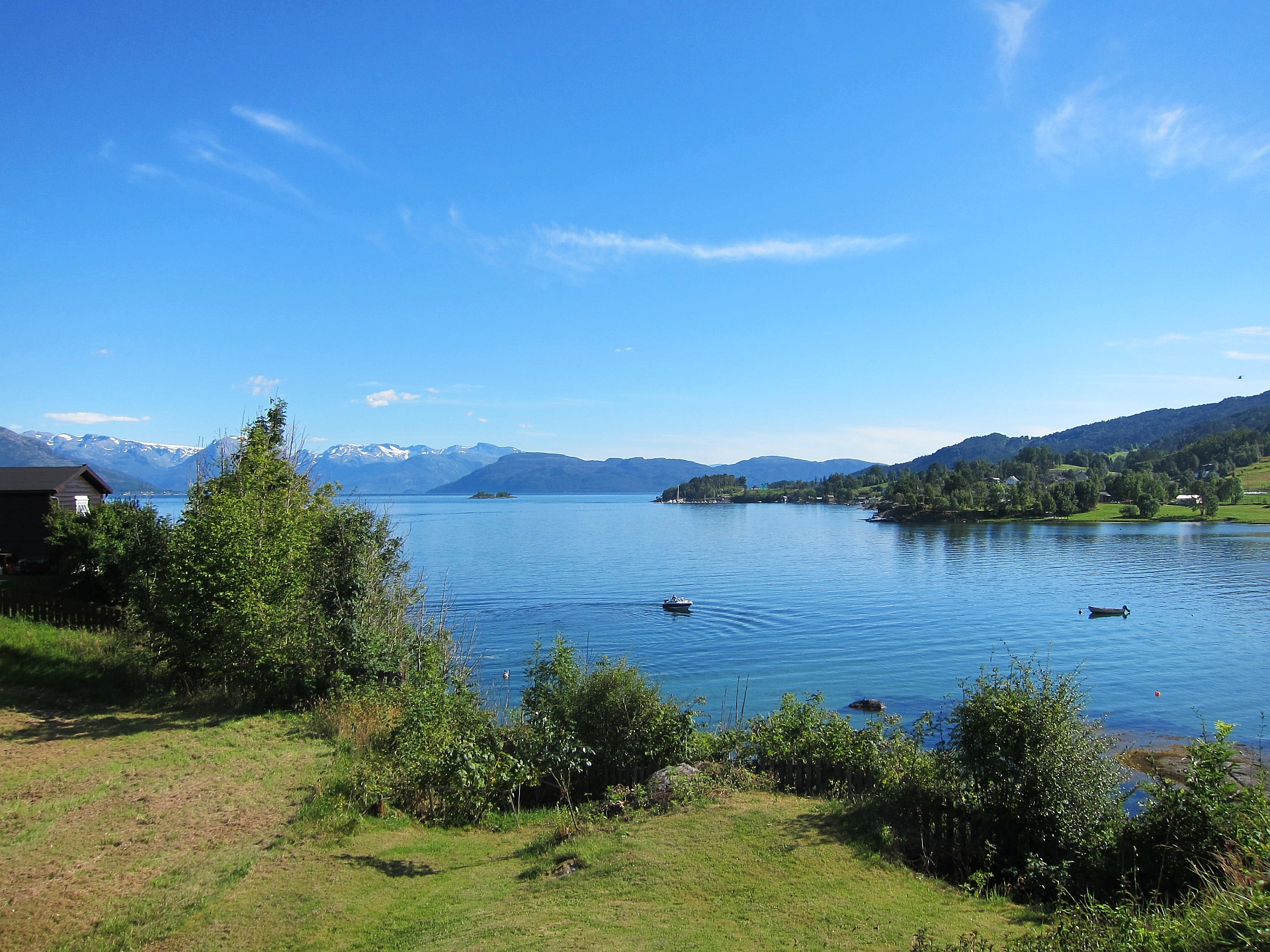 The Hardanger fjord at Strandebarm.